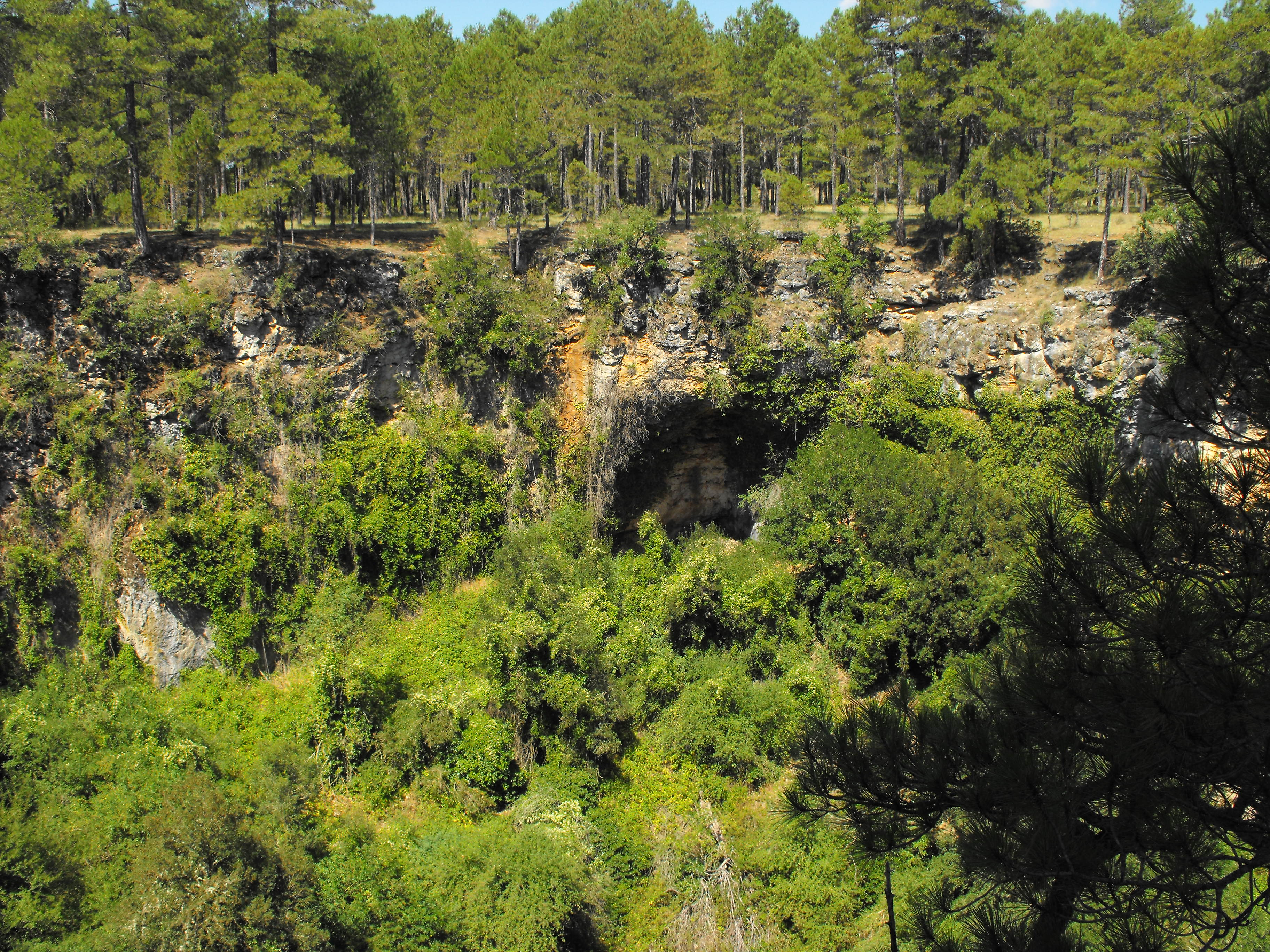 Torcas de los Palancares - Cuenca - Spain